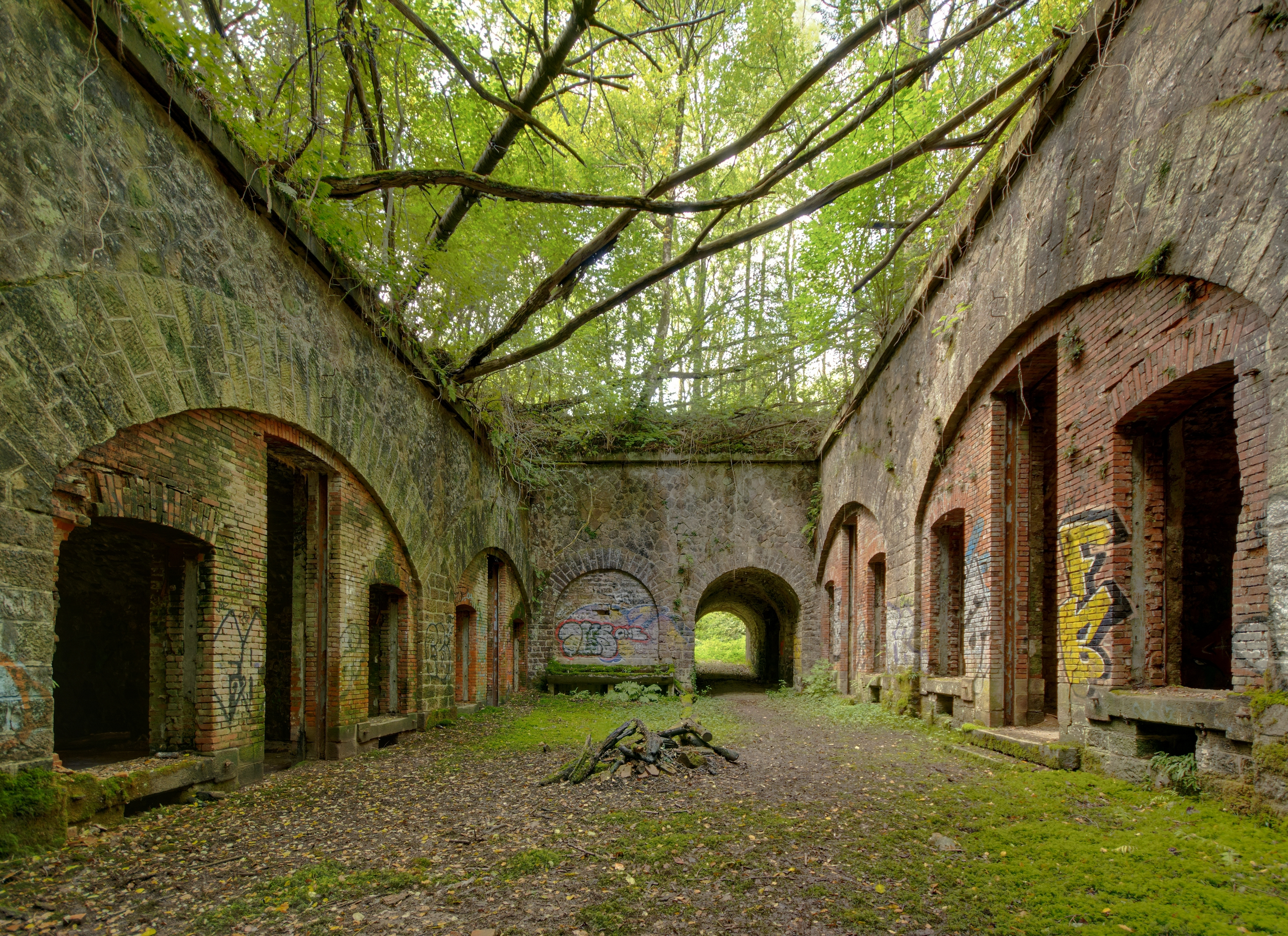 This photograph was taken with a Nikon D300 Fort d'Arches : la cour intérieure avec, de chaque côté, le casernement de paix (HDR).